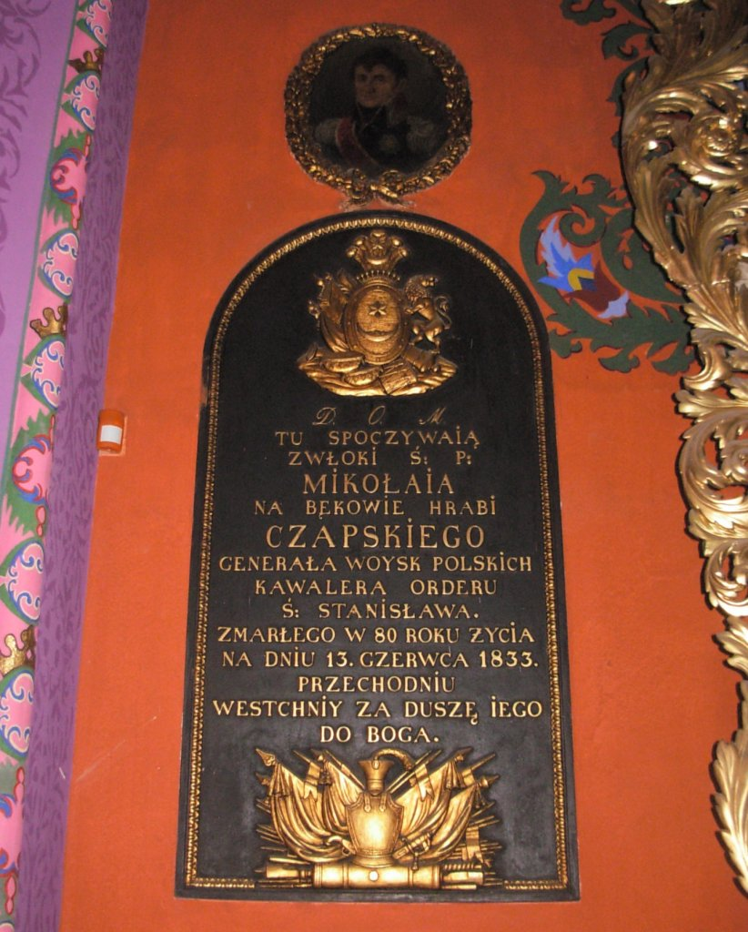 Klasycystyczna płyta nagrobna Mikołaja Czapskiego (generała Wojsk Polskich, 1753-.1833), z czarnego marmuru, z herbem Leliwa i panopliami oraz z medalionem, w którym umieszczono portret zmarłego otoczony stiukowym wieńcem laurowym (1833 r). Znajduje się na zamknięciu nawy południowej, przy łuku tęczowym.